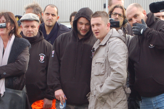 Demonstranten van de 'European Defence League' (EDL). In het midden (grijze jas) staat Stephen Yaxley-Lennon (pseudoniem: Tommy Robinson), voormalig leider van de EDL.